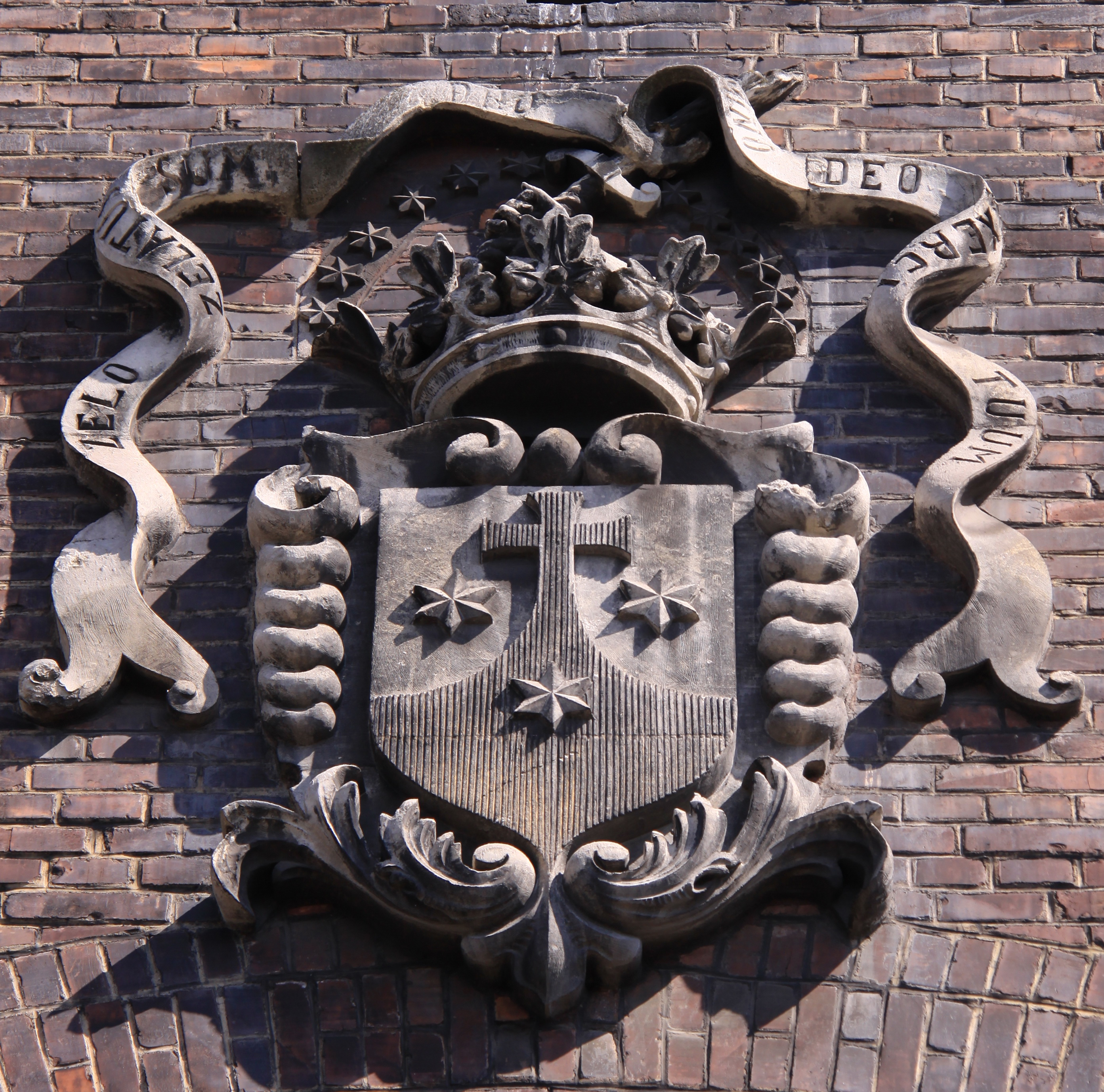 Herb zakonu Karmelitów na frontowej ścianie kościoła Klasztoru Karmelitów Bosych, Kraków, ul. Rakowicka 30